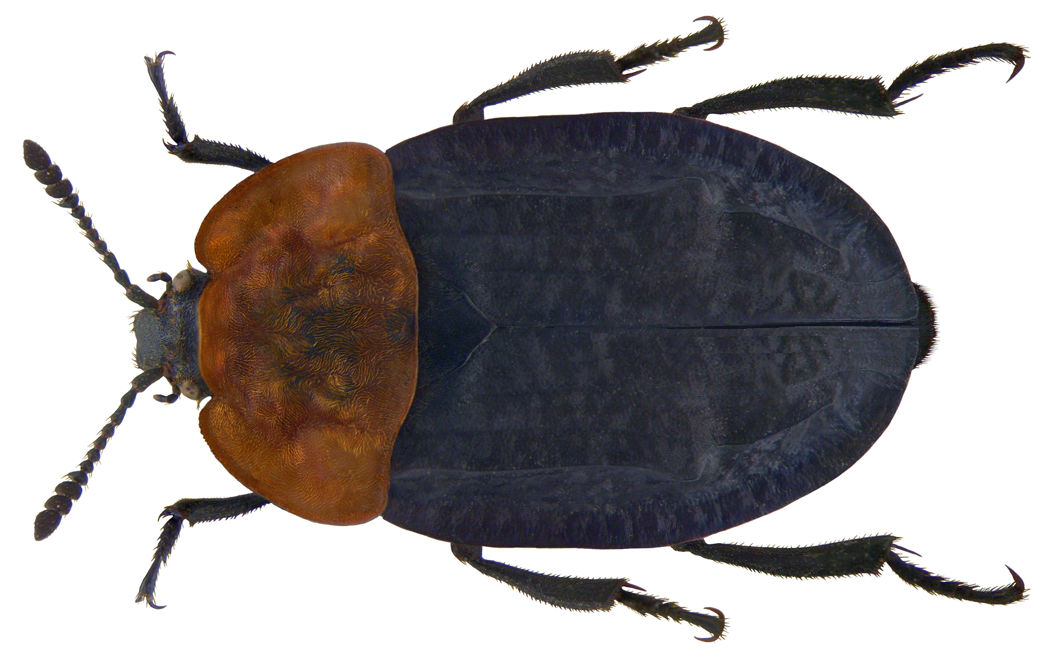 Familie: Silphidae Grösse: 11-16 mm Verbreitung: Europa bis Japan Ökologie: an Aas und Kot, häufig an Phallus impudicus (Stinkmorchel) Fundort: Germania, Bayern, Oberfranken, Kulmbach leg. det. U.Schmidt, 1974 Foto: U.Schmidt, 2009